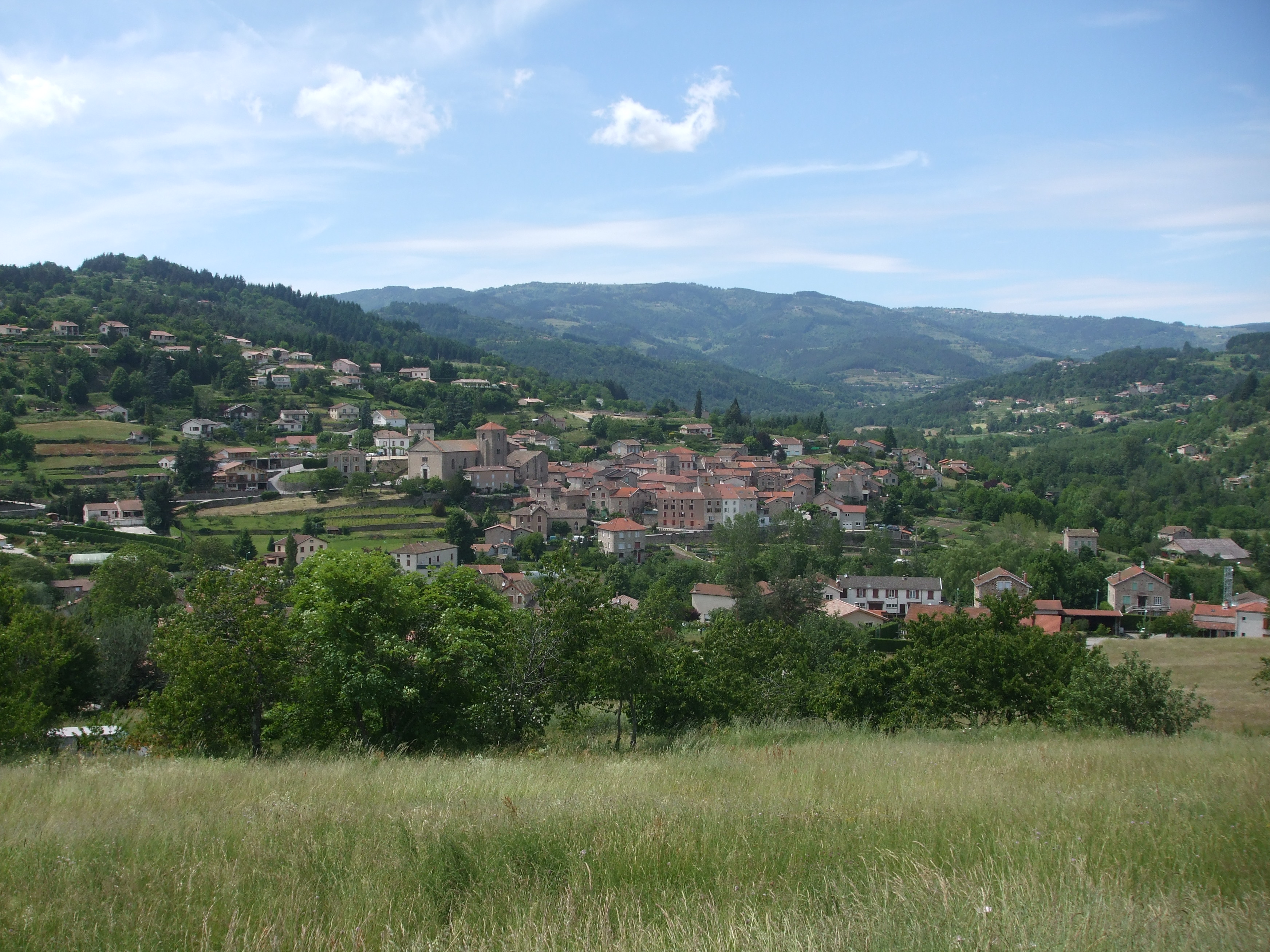 vue générale